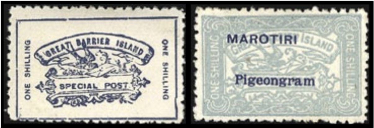 Taubenpostbriefmarken aus Neuseeland. Die erste Taubenpostbriefmarke der Great Barrier Insel und der Marotiri Insel (1898)